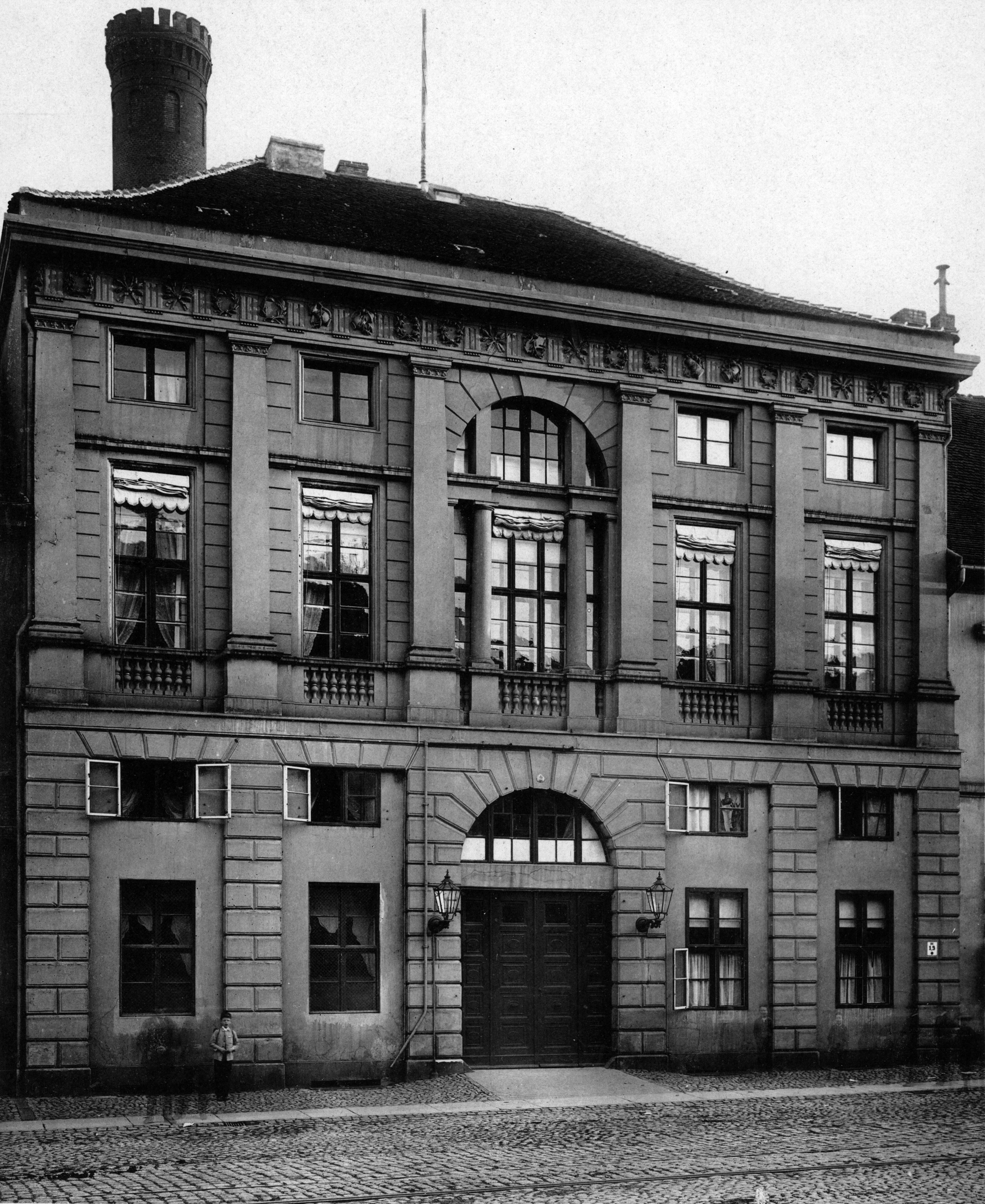 Potsdam, ehemaliges Kraatz'sches Haus, Blücherplatz 2